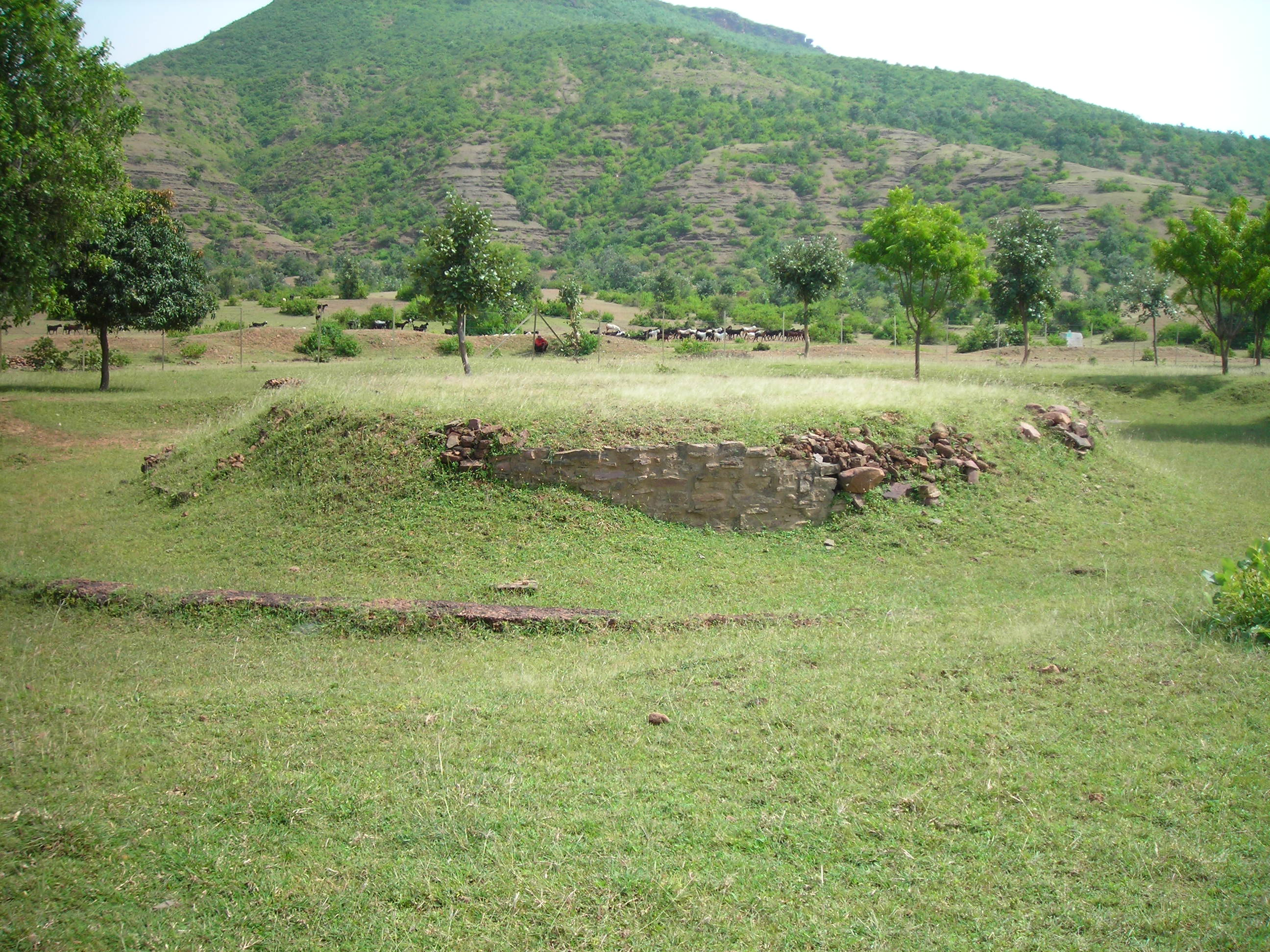 Bharhut Stupa Site